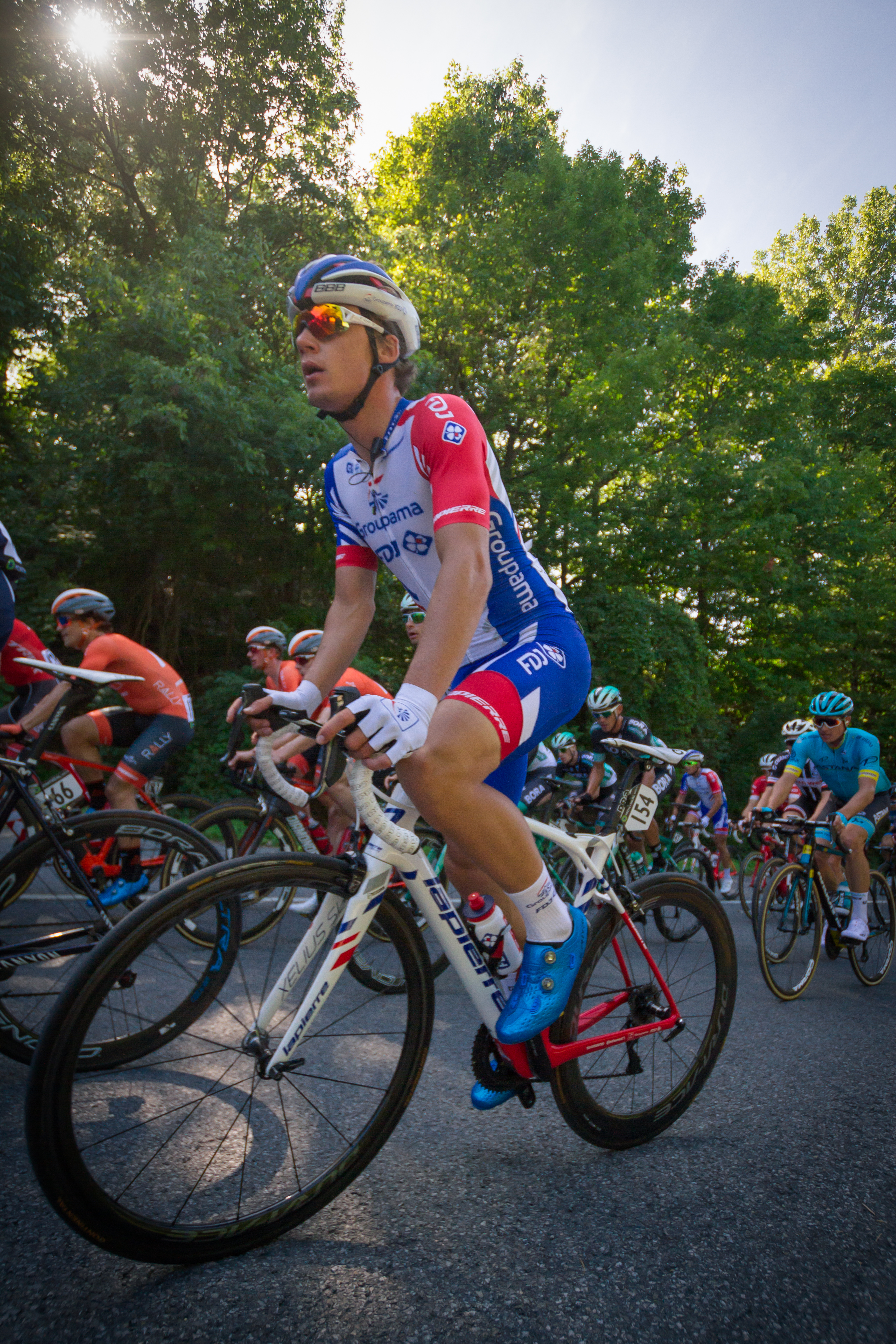 Valentin Madoua (FRA) Groupama - FDJ. GPCQM - Grand Prix Cyclistes de Montreal et Quebec. Montreal 2018.